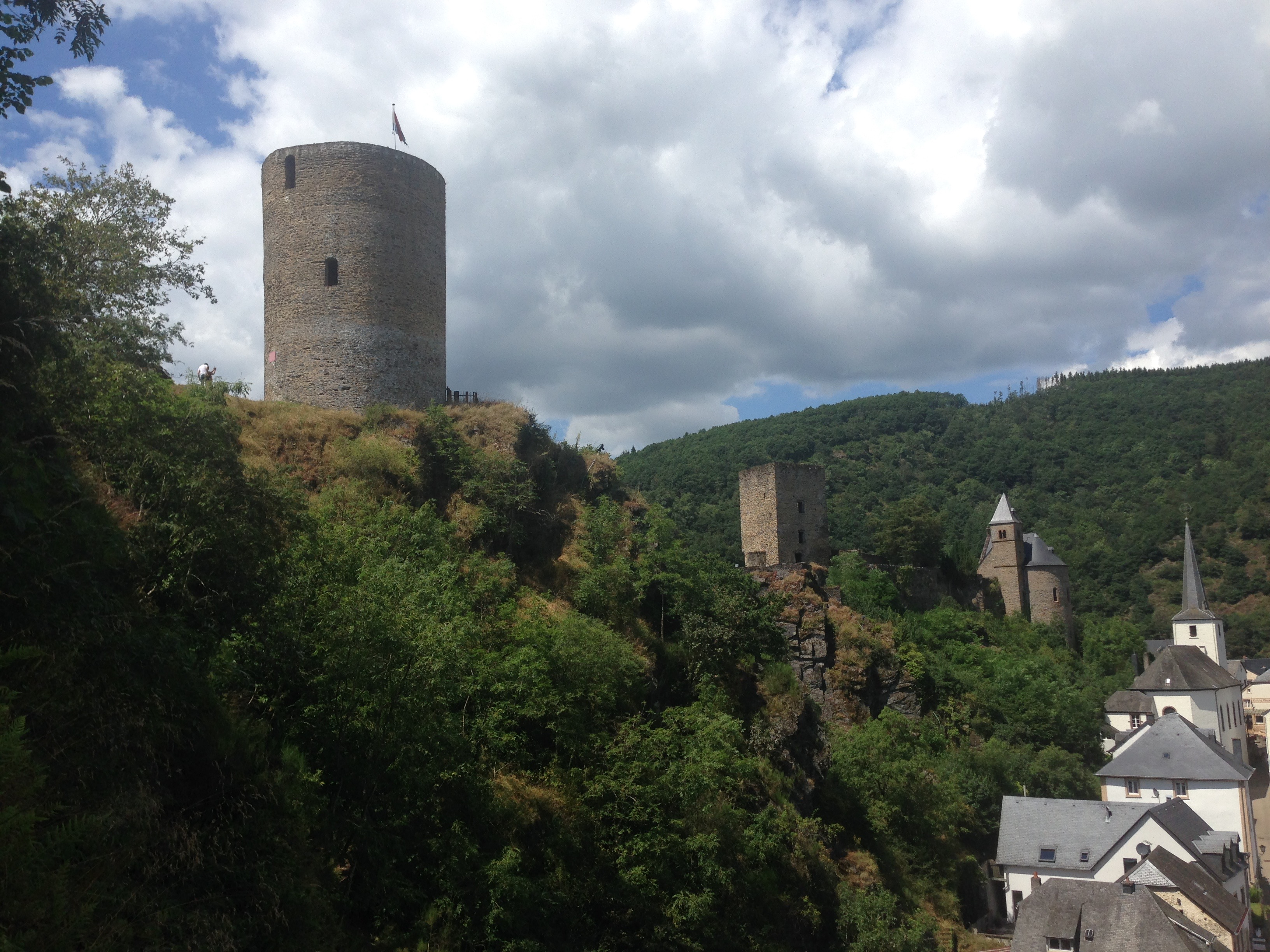 Teil des Schlosses von Esch-Sauer in Luxemburg